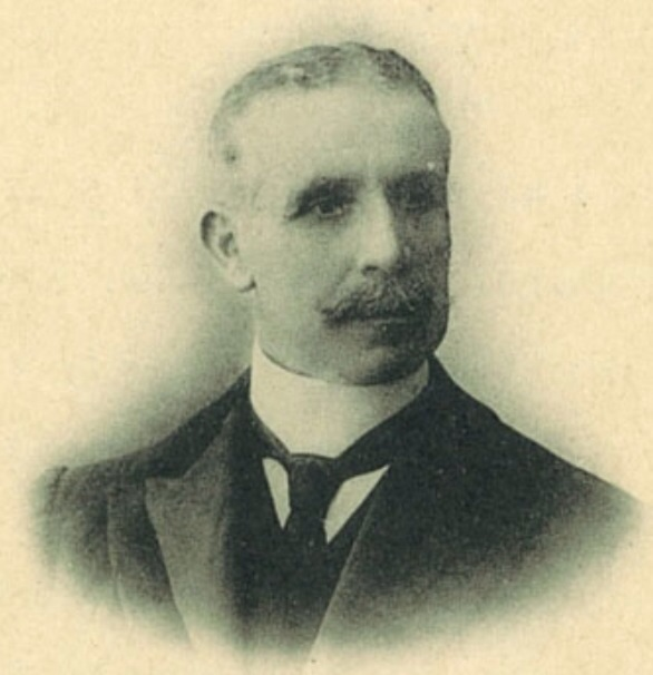 Retrato de Andrés Fernández de Henestrosa y Ortiz de Mioño (1852-1914), I conde de San Martín de Hoyos